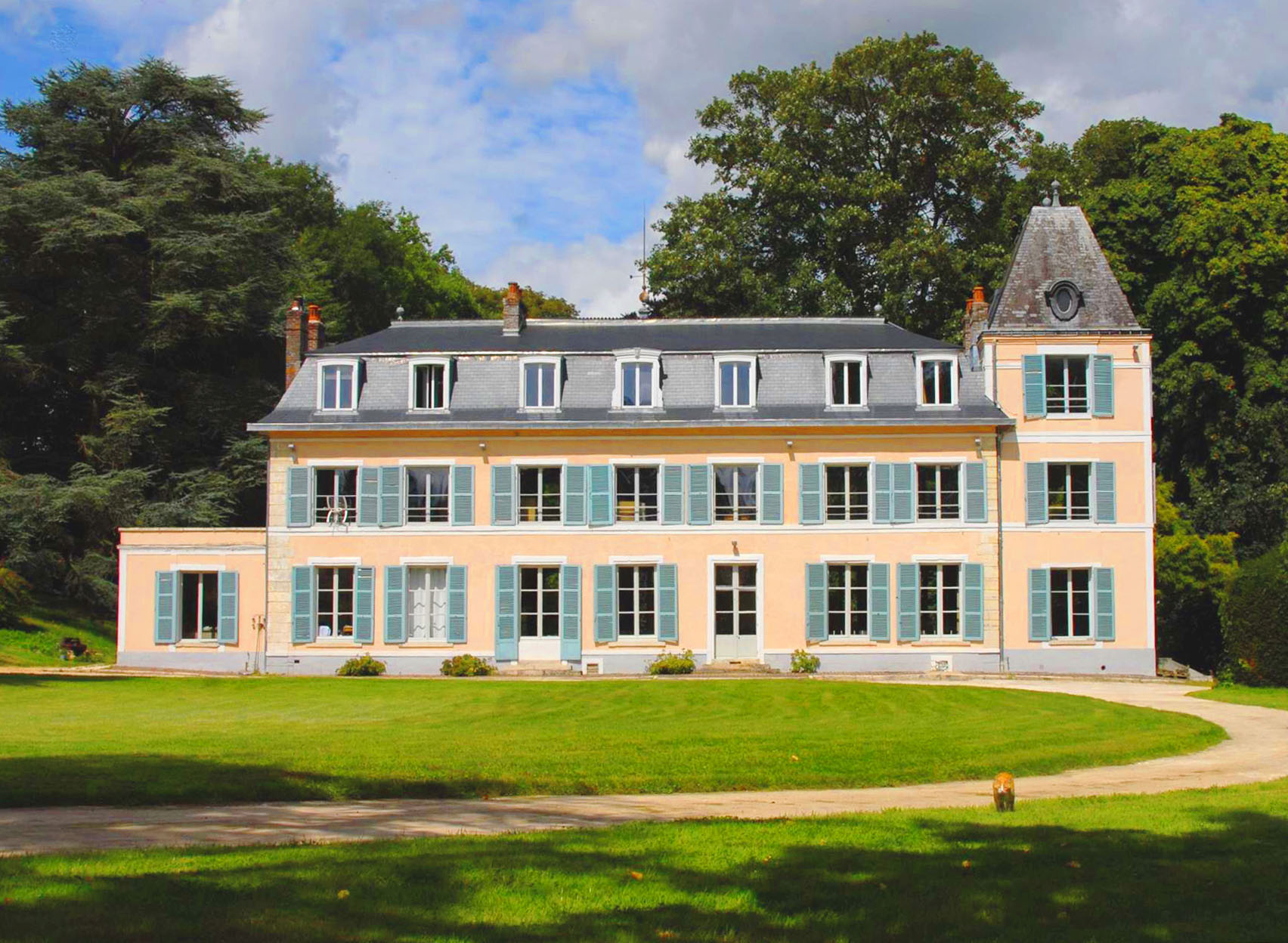 Château d'Amécourt en 2014